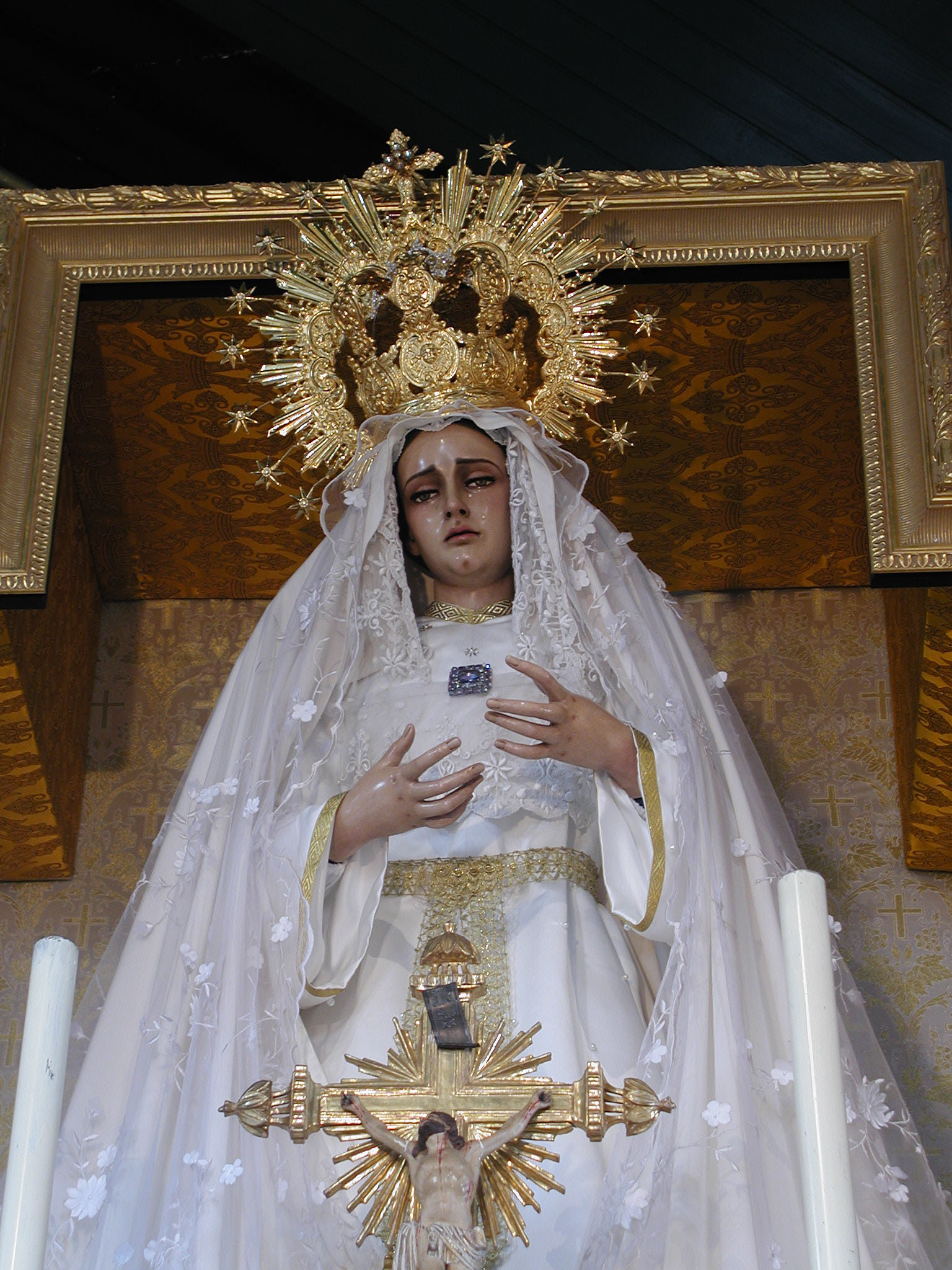 Den smärtofyllda Jungfru Maria.